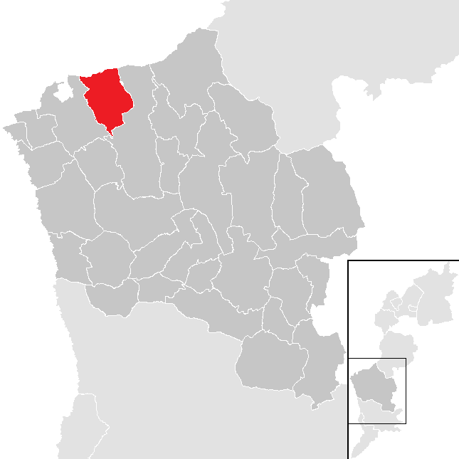 Bezirk Oberwart